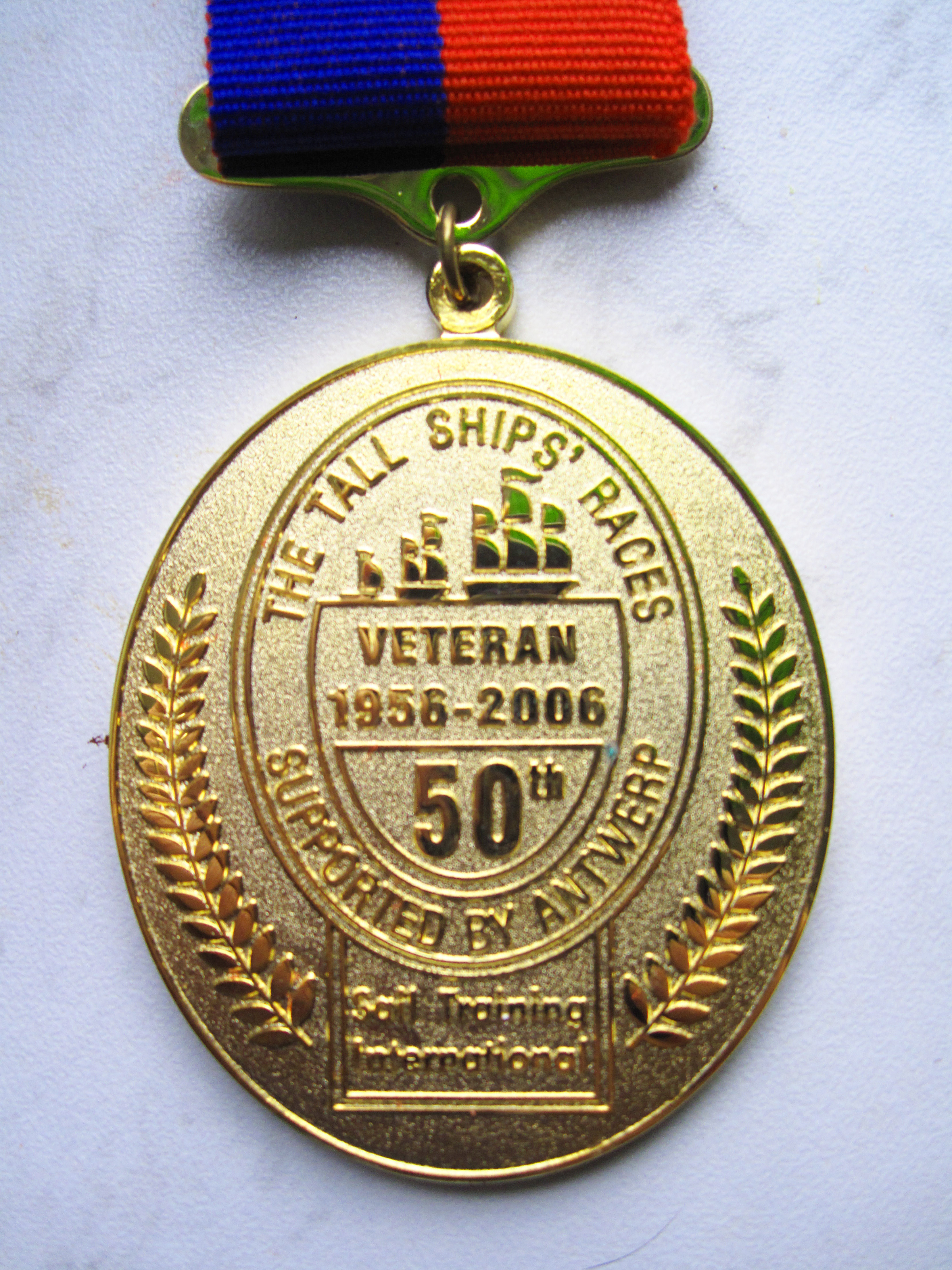 Médaille de vétéran remise en 2006 aux équipages des navires ayant participé à la Première Régate Internationale en 1956.